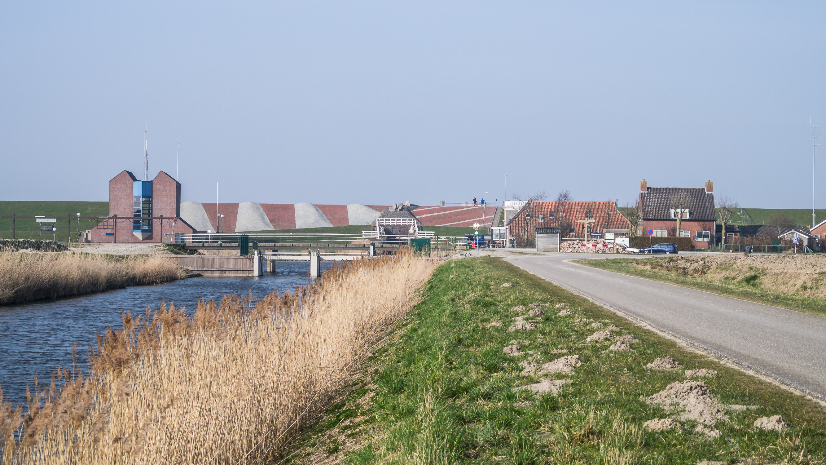 Blik op Noordpolderzijl